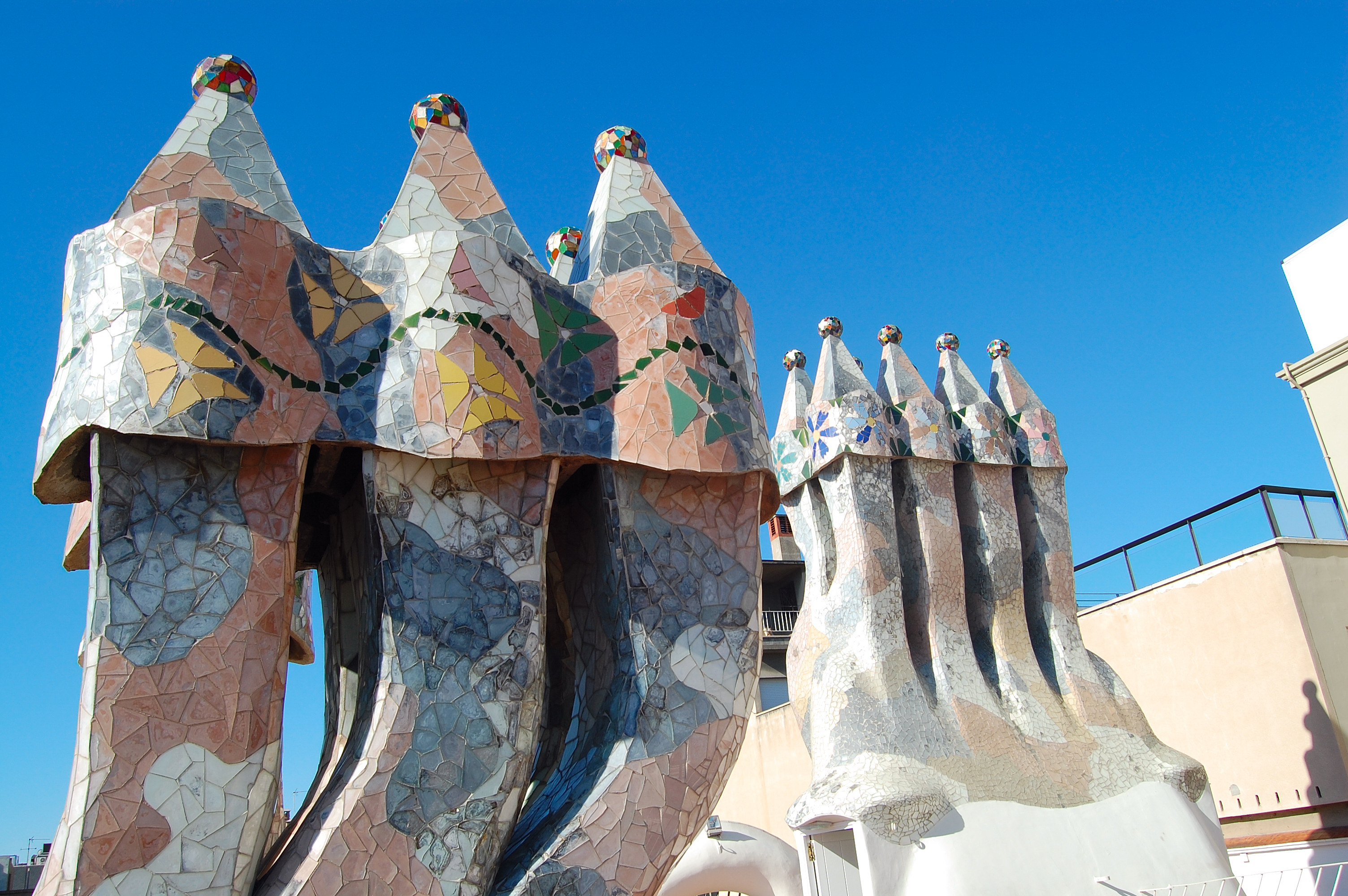 Casa Batlló - Barcellona Antoni Gaudi